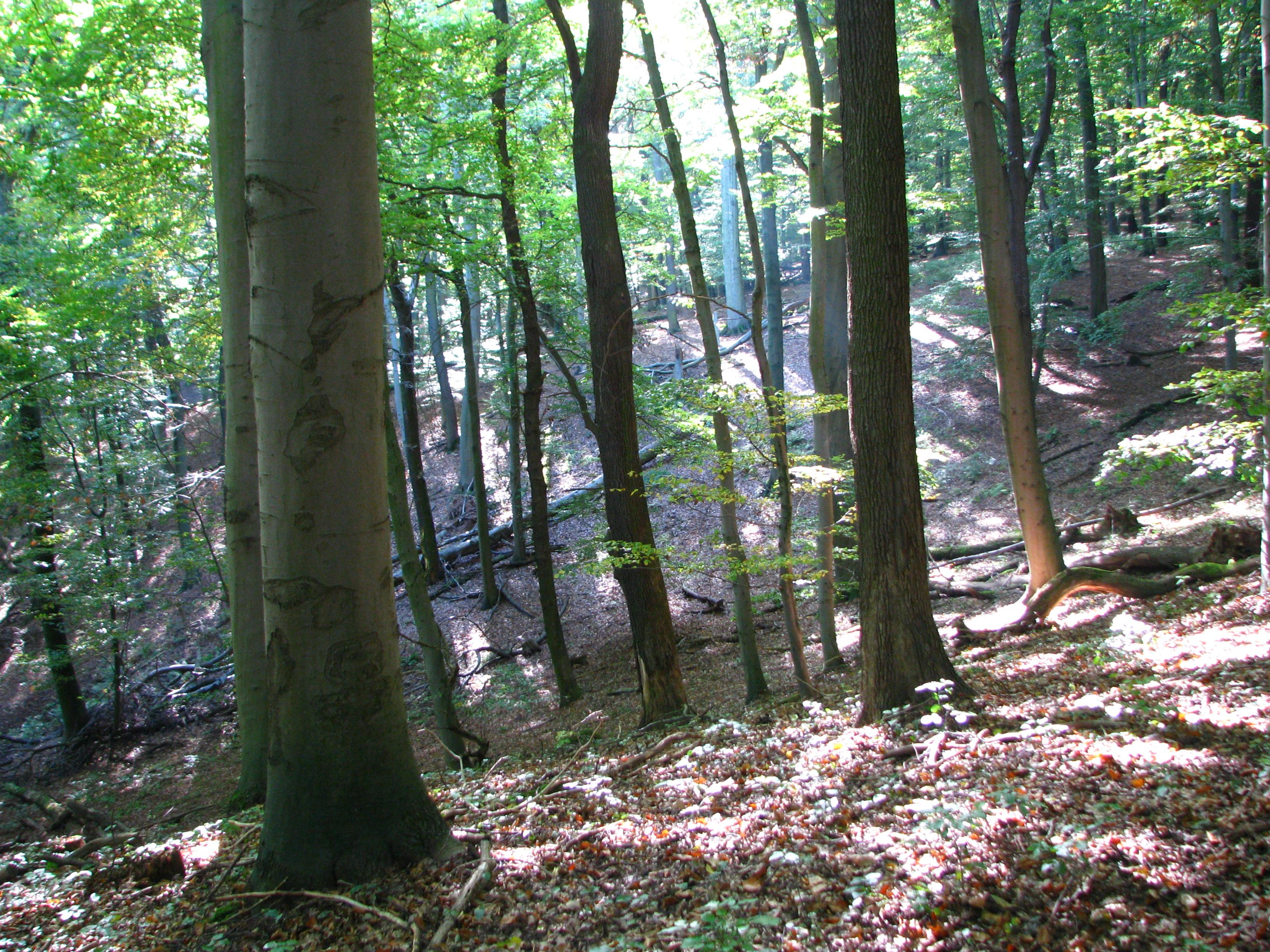 Alter Buchen-Mischwald mit hohem Totholzanteil in der Hohen Schrecke bei Gehofen (Thüringen).